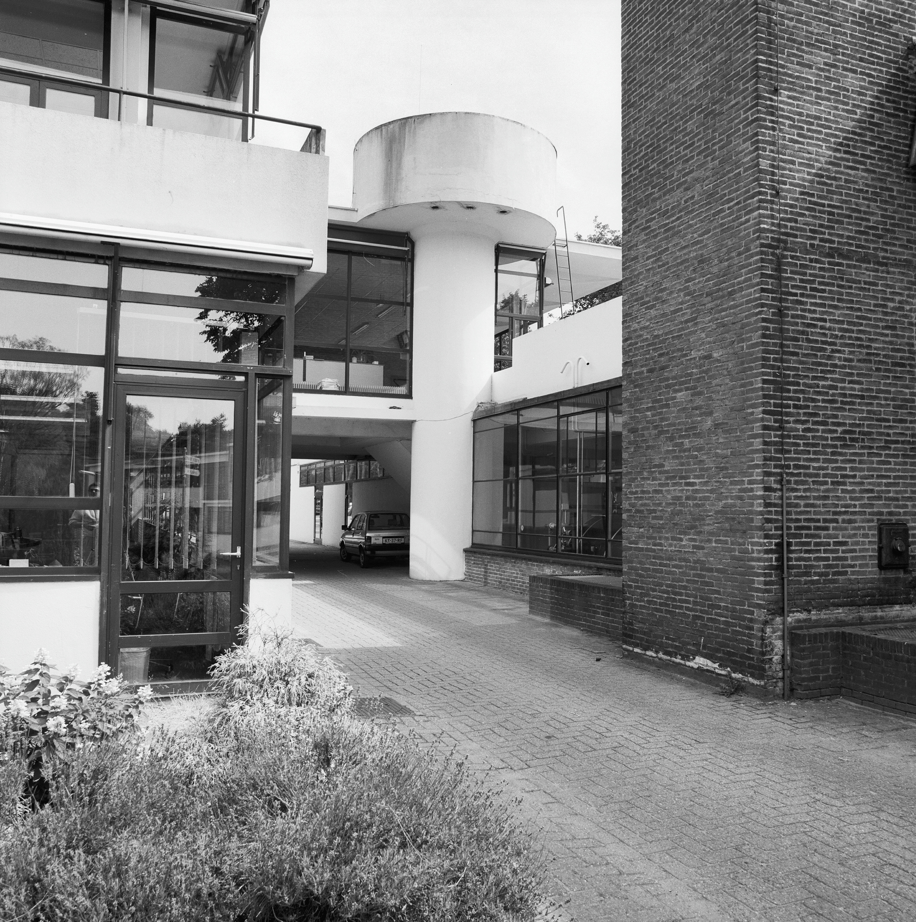 Sanatorium Zonnestraal: hoofdgebouw, waterreservoir en gedeelte schoorsteen uiterst rechts